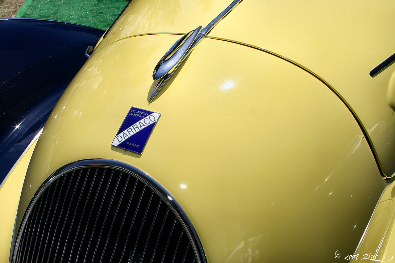 BADGE 1938 Darracq-Talbot Lago T150 C Figoni & Falaschi Roadster